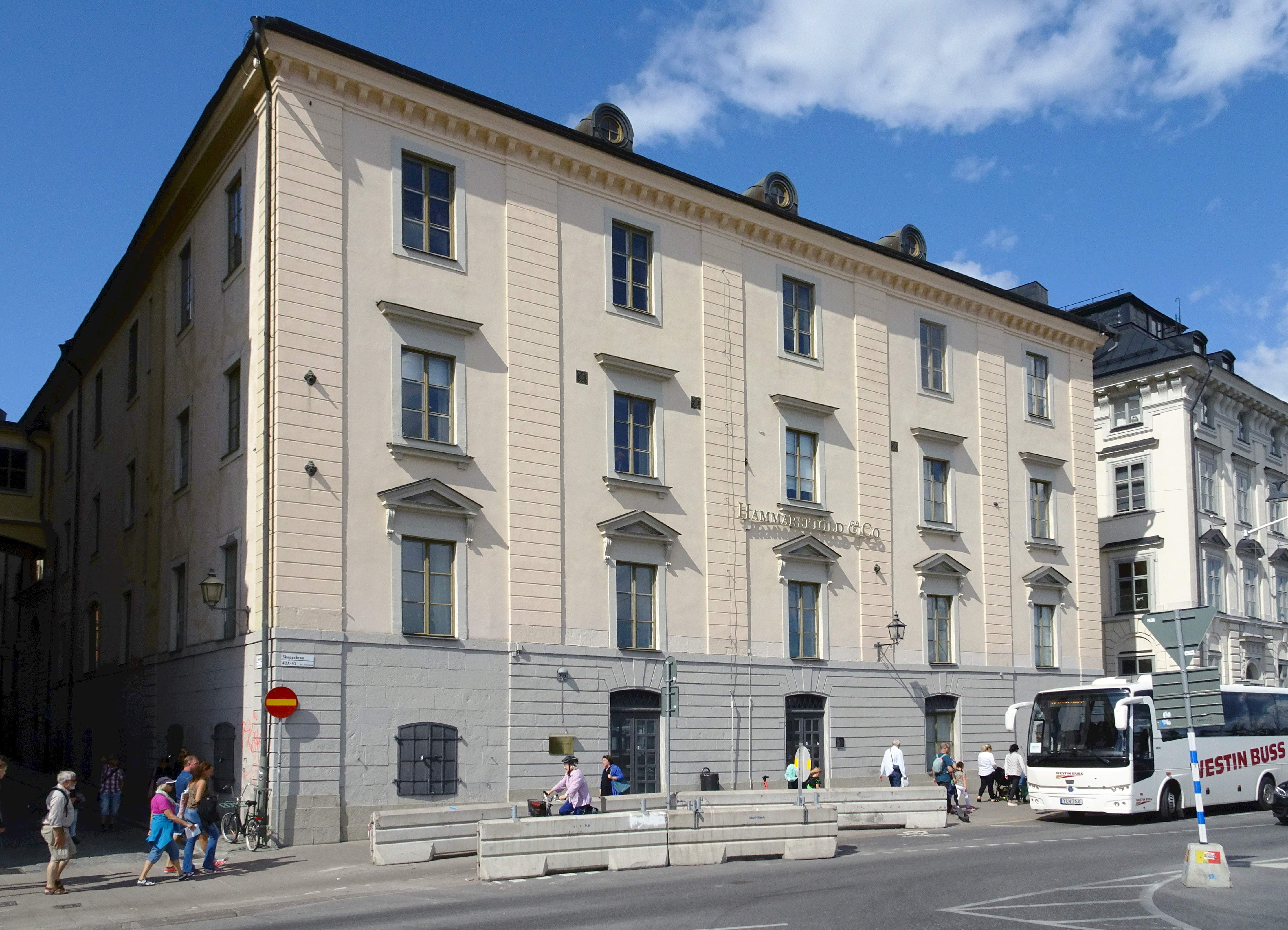 Norra Bankohuset, fasad mot Skeppsbron